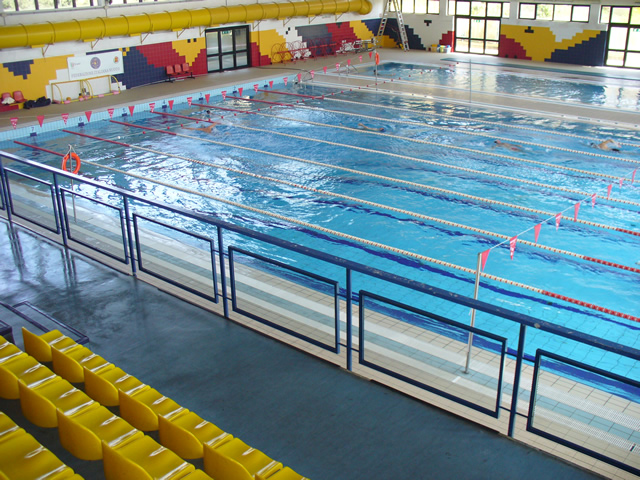 Piscina comunale di Caltanissetta